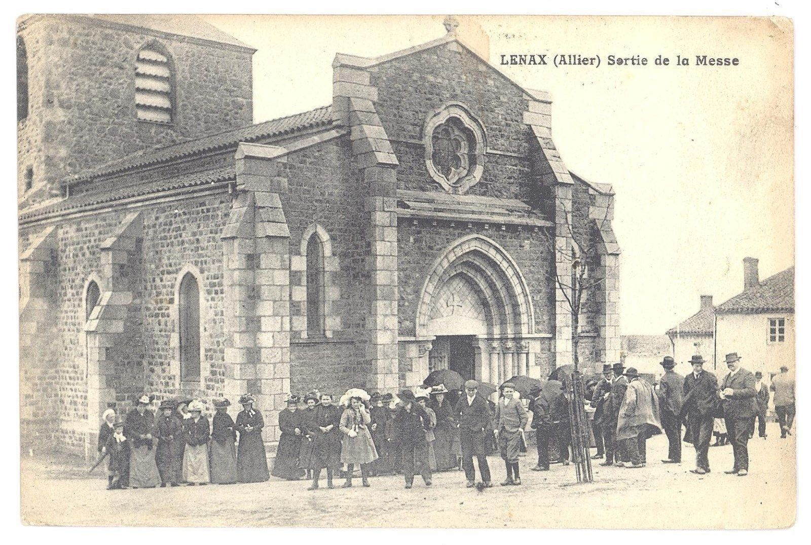 Sortie de messe à Lenax vers 1910.